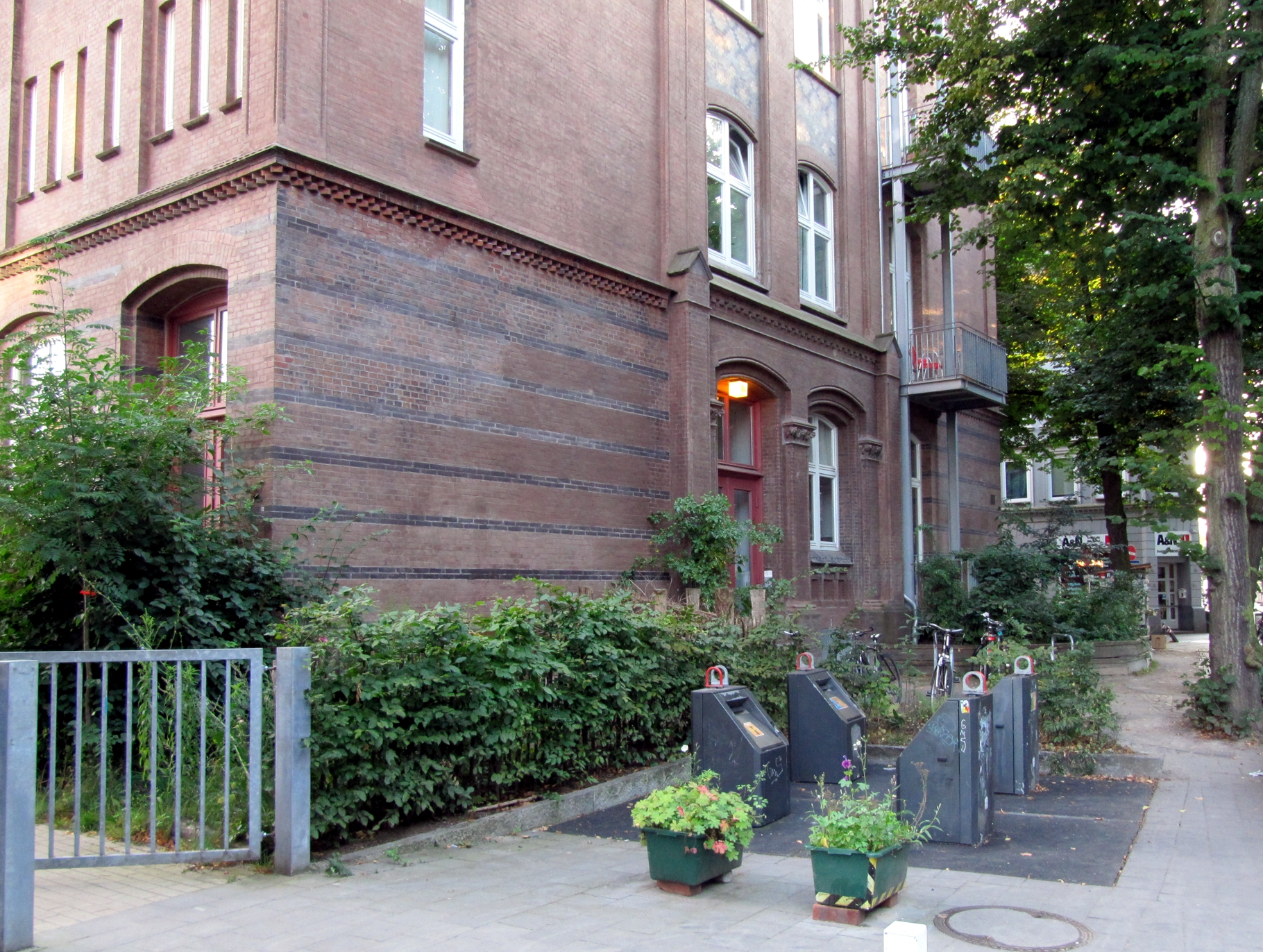 Chemnitzstraße, HH-Altona: Sackabfuhr durch Unterflursysteme ersetzt